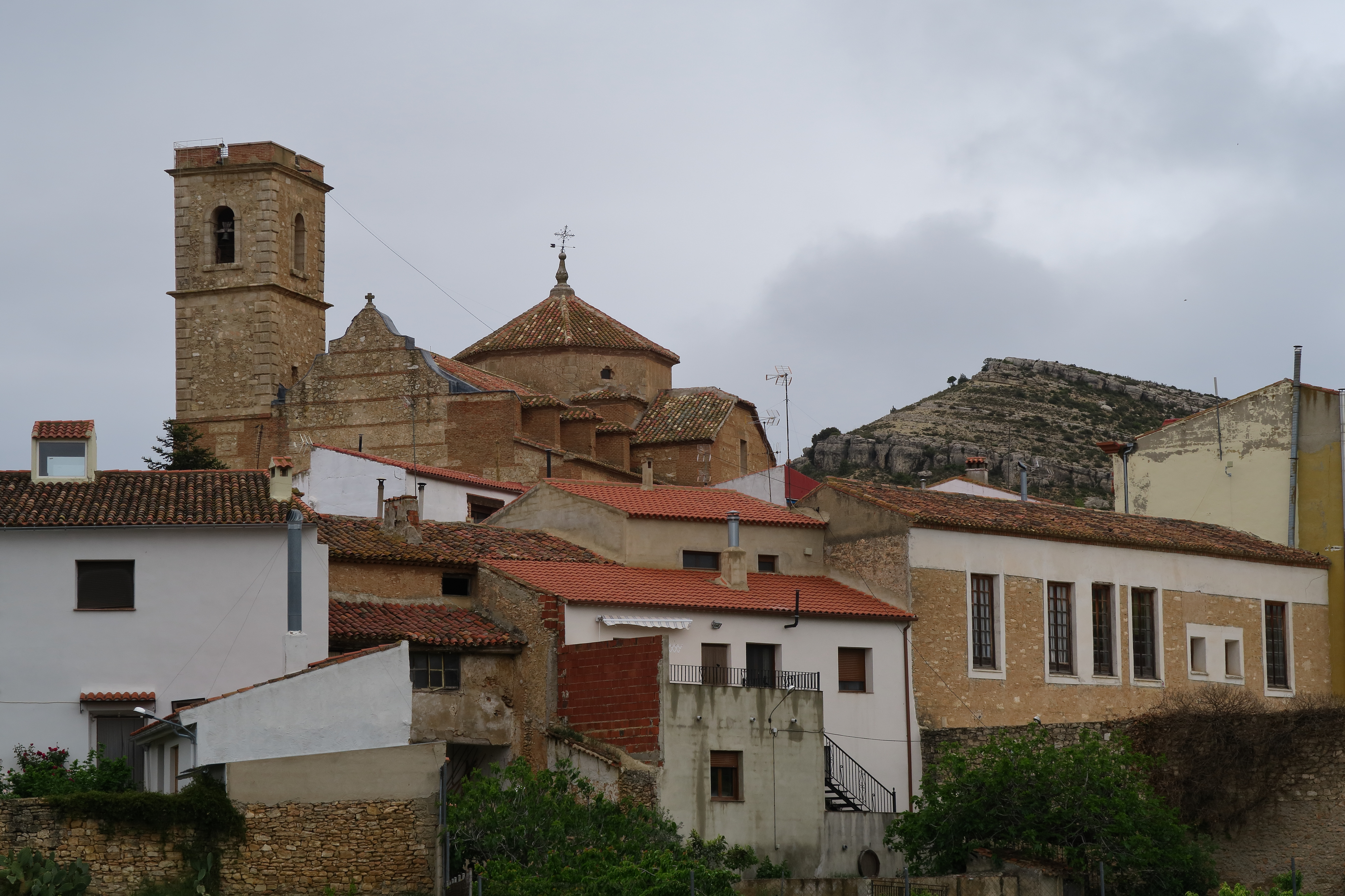 Alatoz, 02